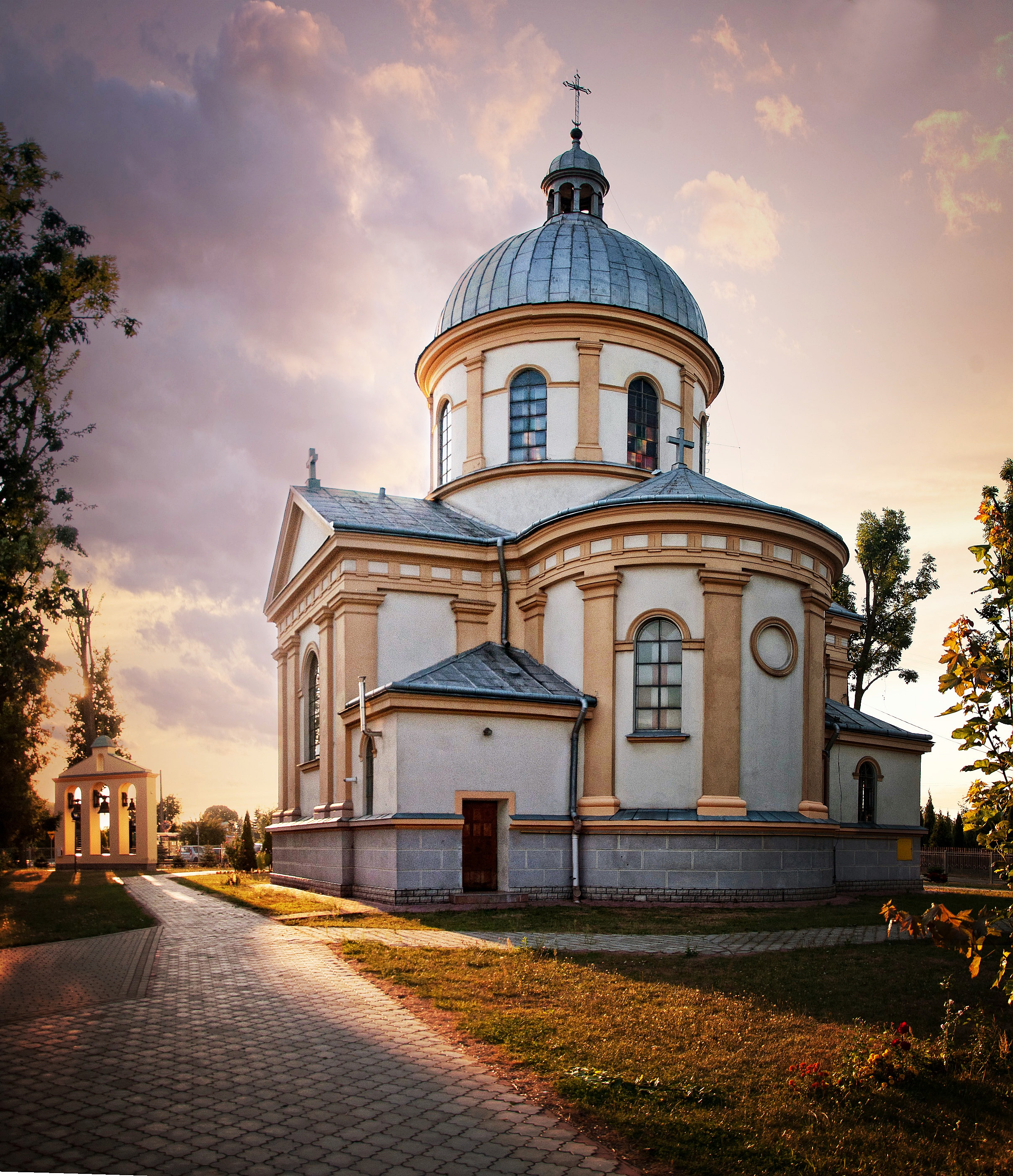 Dawna cerkiew greckokatolicka z XIX w., w Starym Mieście , obecnie rzymskokatolicki kościół parafialny pw. św. Andrzeja Boboli